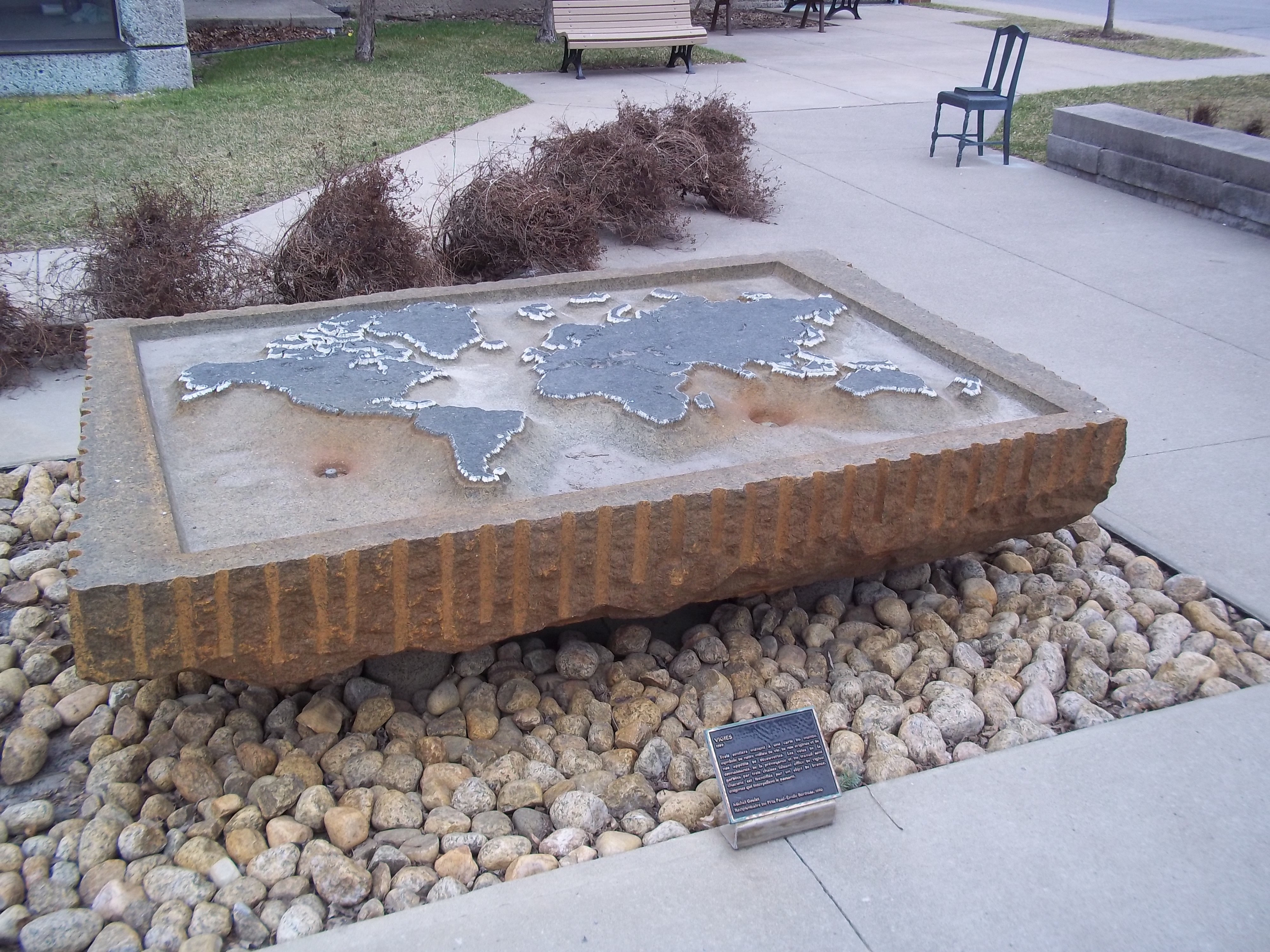 Sculpture de Michel Goulet intitulée Vigies, de 1989. Elle est située devant le Pavillon Côte-des-Neiges de l'Institut universitaire de gériatrie de Montréal, au 4565 chemin Queen-Mary. « Trois sentiers mènent à une carte du monde, symbole de notre milieu de vie, de nos origines et de nos appétits de découvertes. Les voies de la connaissance, de la prévoyance et du travail sont gardées par trois chaises faisant office de vigies; chacune est identifiée par un objet de bronze, énigmes qui interpellent le passant. »